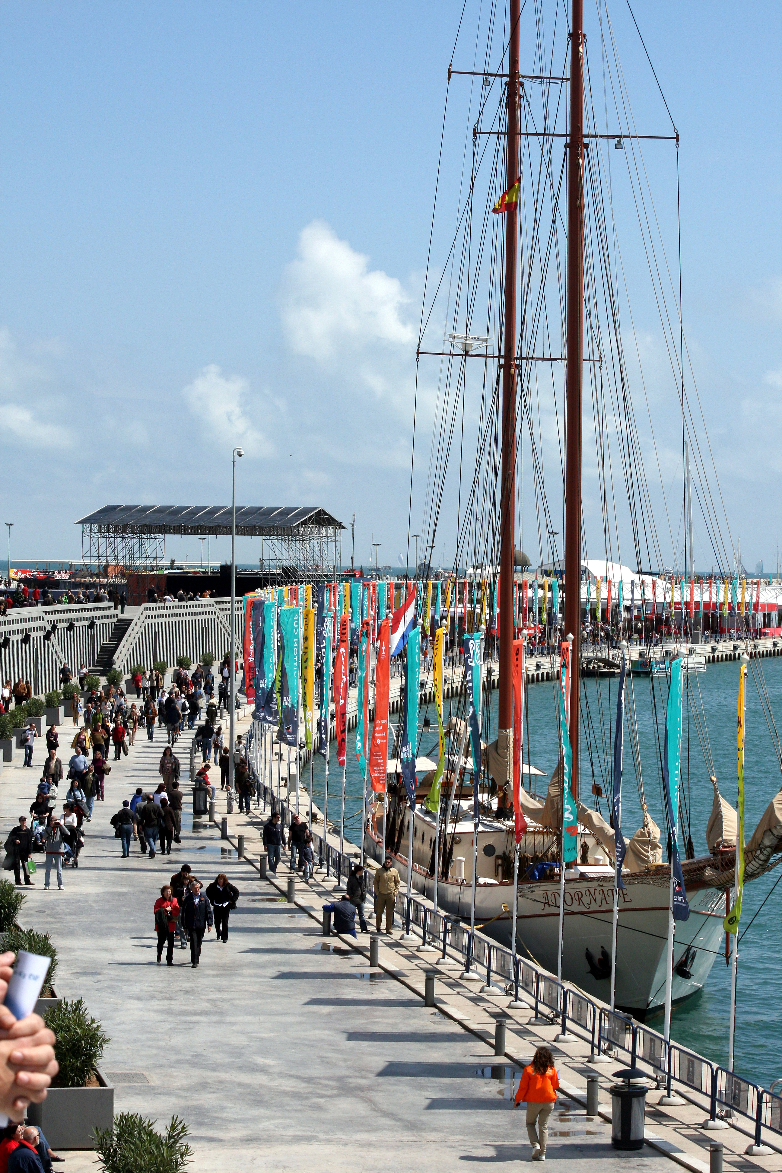 Stagsegelschoner Adornate [IMO: 5023796] während des America's Cup im Hafen von Valencia